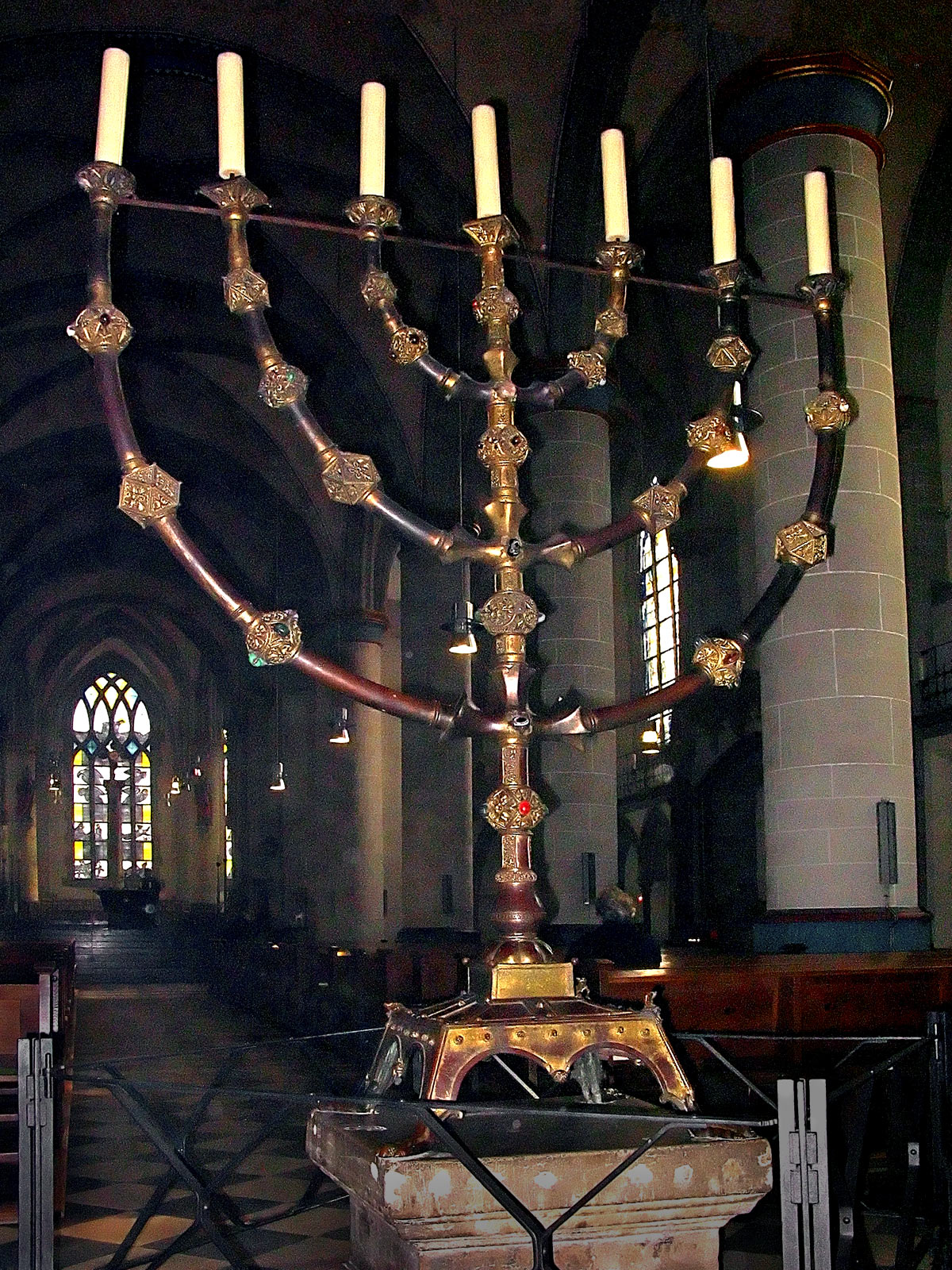 Siebenarmiger Leuchter, entstanden unter der Essener Äbtissin Mathilde, um 1000 nC.